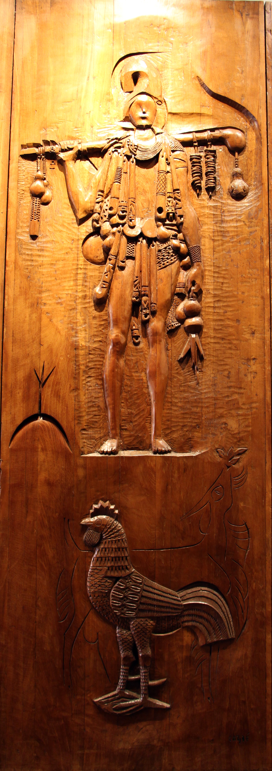 Candomblé nel Museu Afro-Brasileiro, Salvador